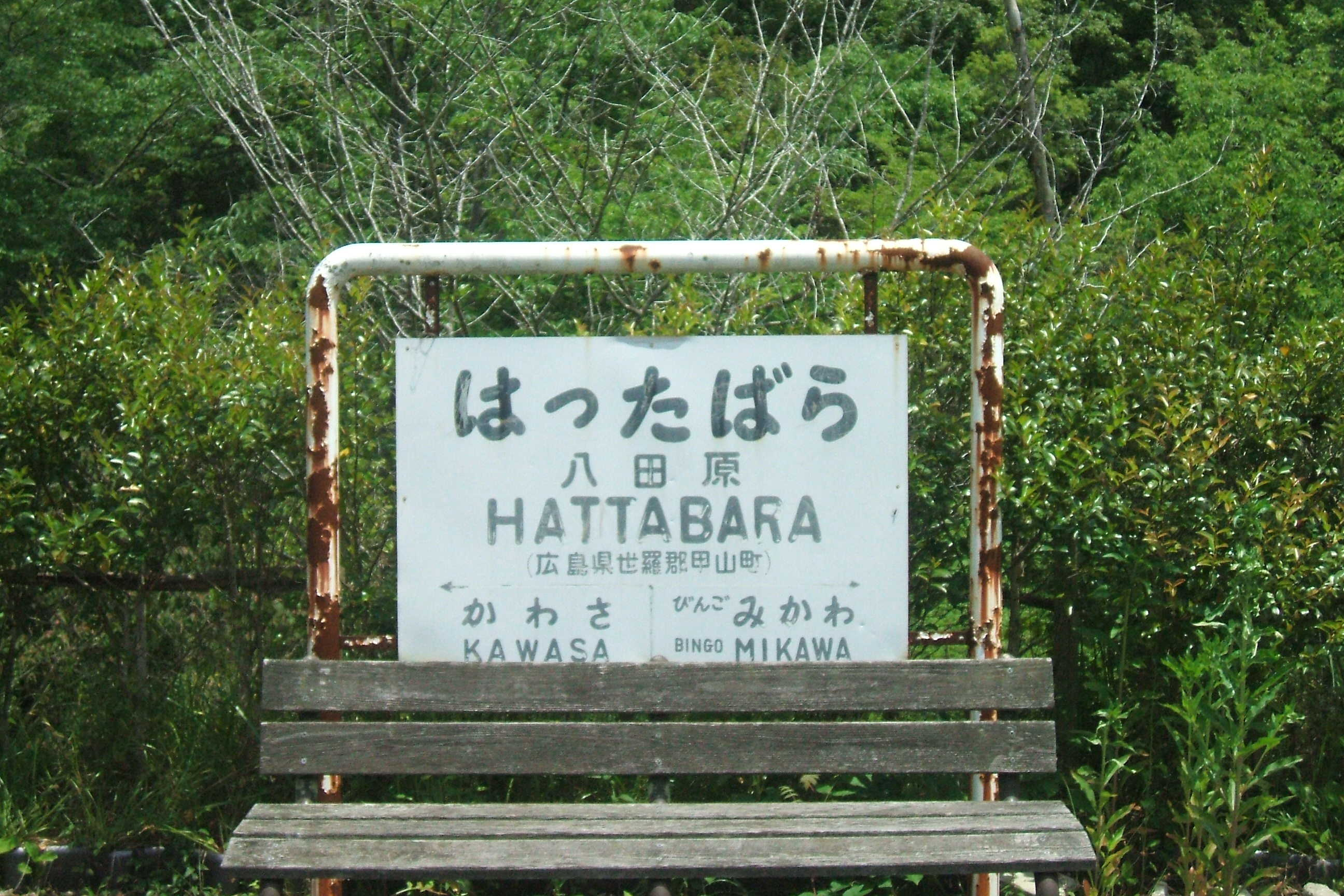 広島県にあった福塩線八田原駅の標識